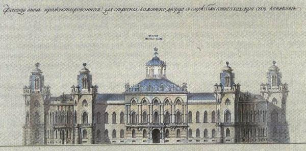 Проект дворца в подмосковном Конькове